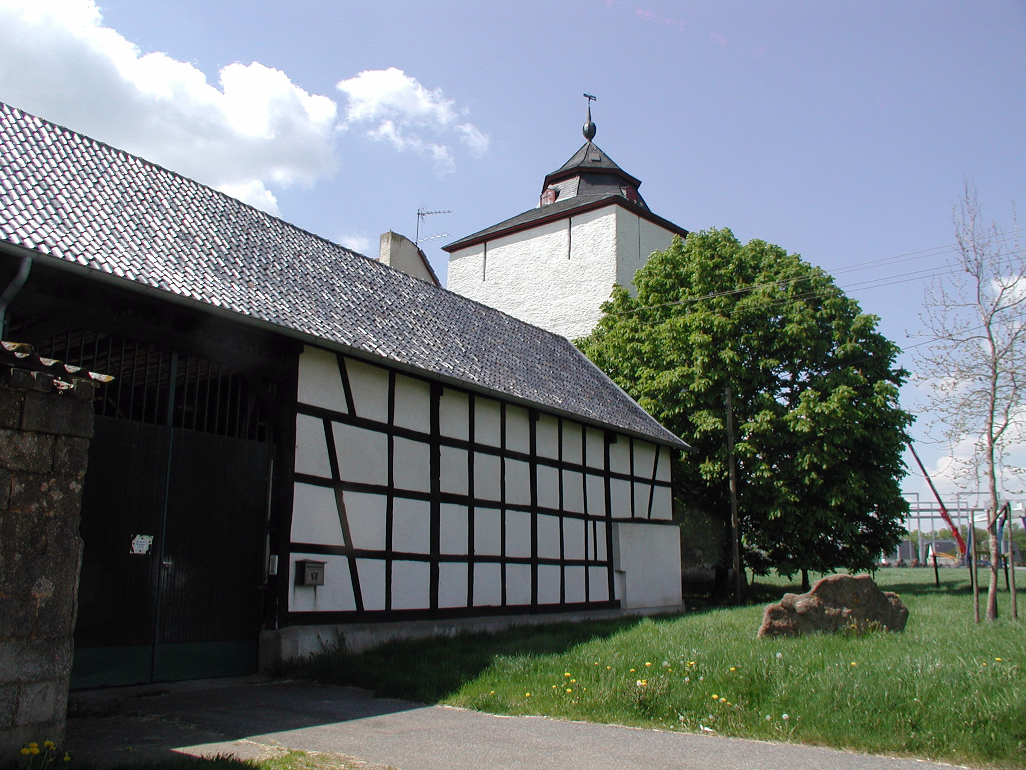 Arloff, Eingang Burghof